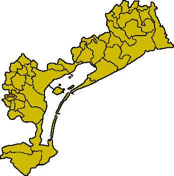 Ubicación del municipio de Fiesso d'Artico en el Venecia.